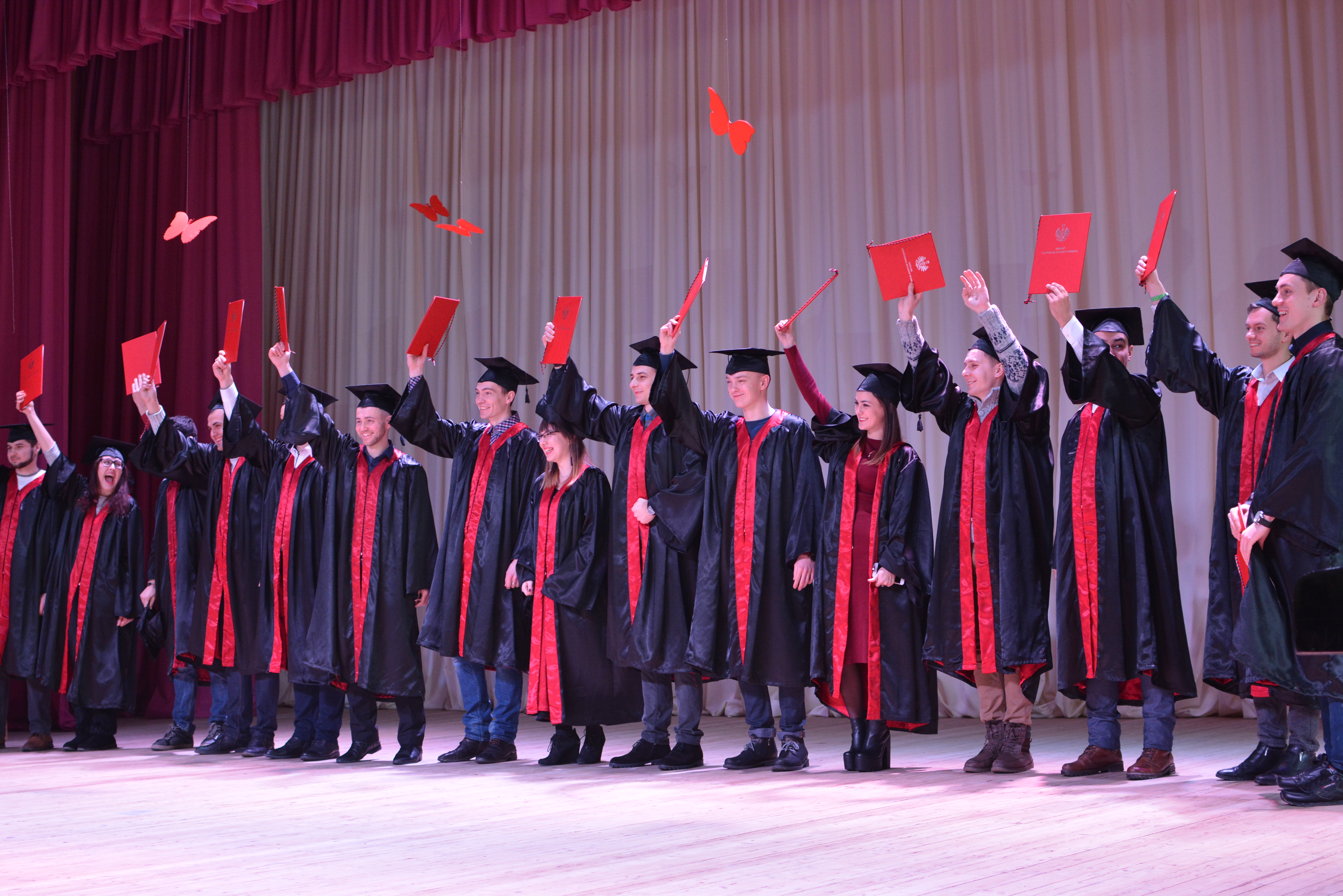 Міжнародна наукова і освітня діяльність